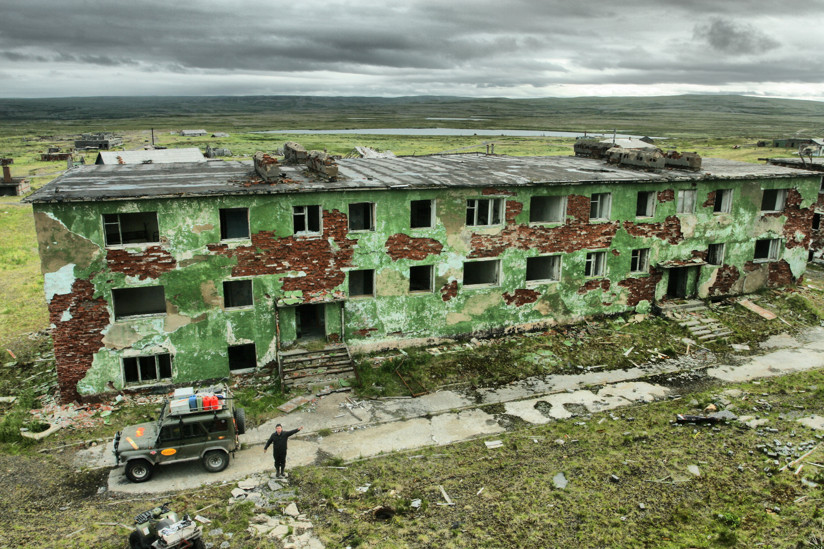 Мыс_Скоробеевский